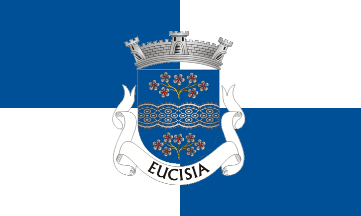 Bandera de la freguesia de Eucísia